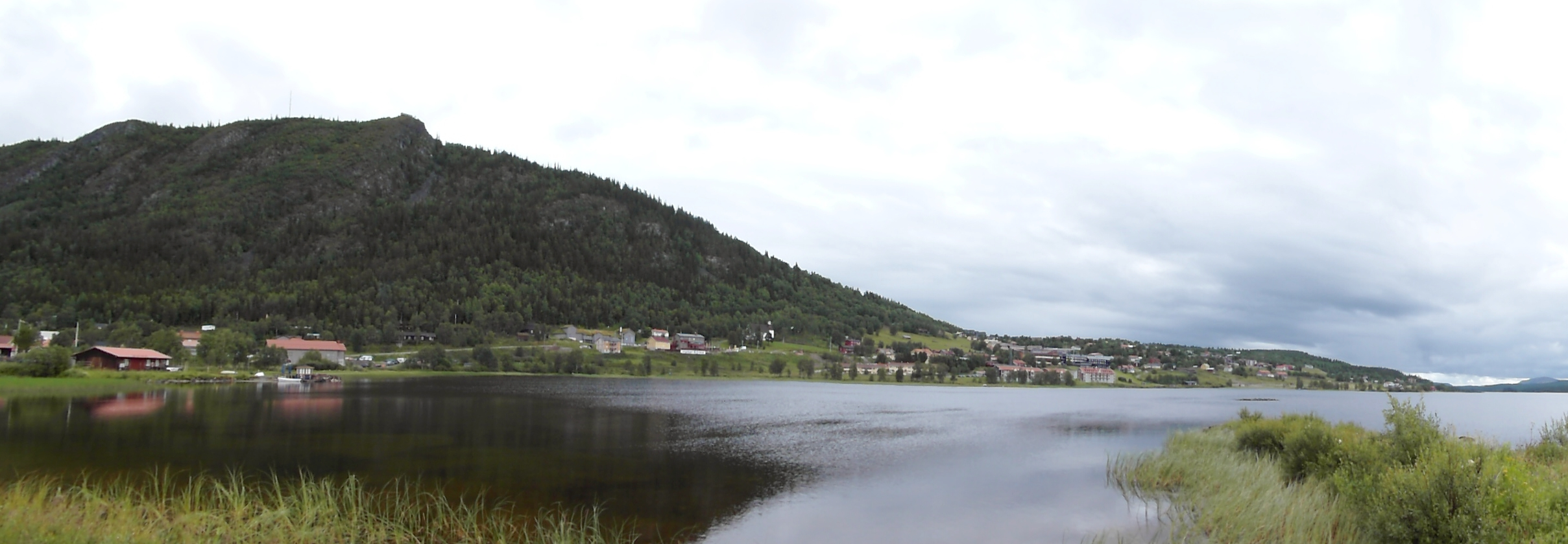 Funäsdalen, Härjedalen, juli 2013